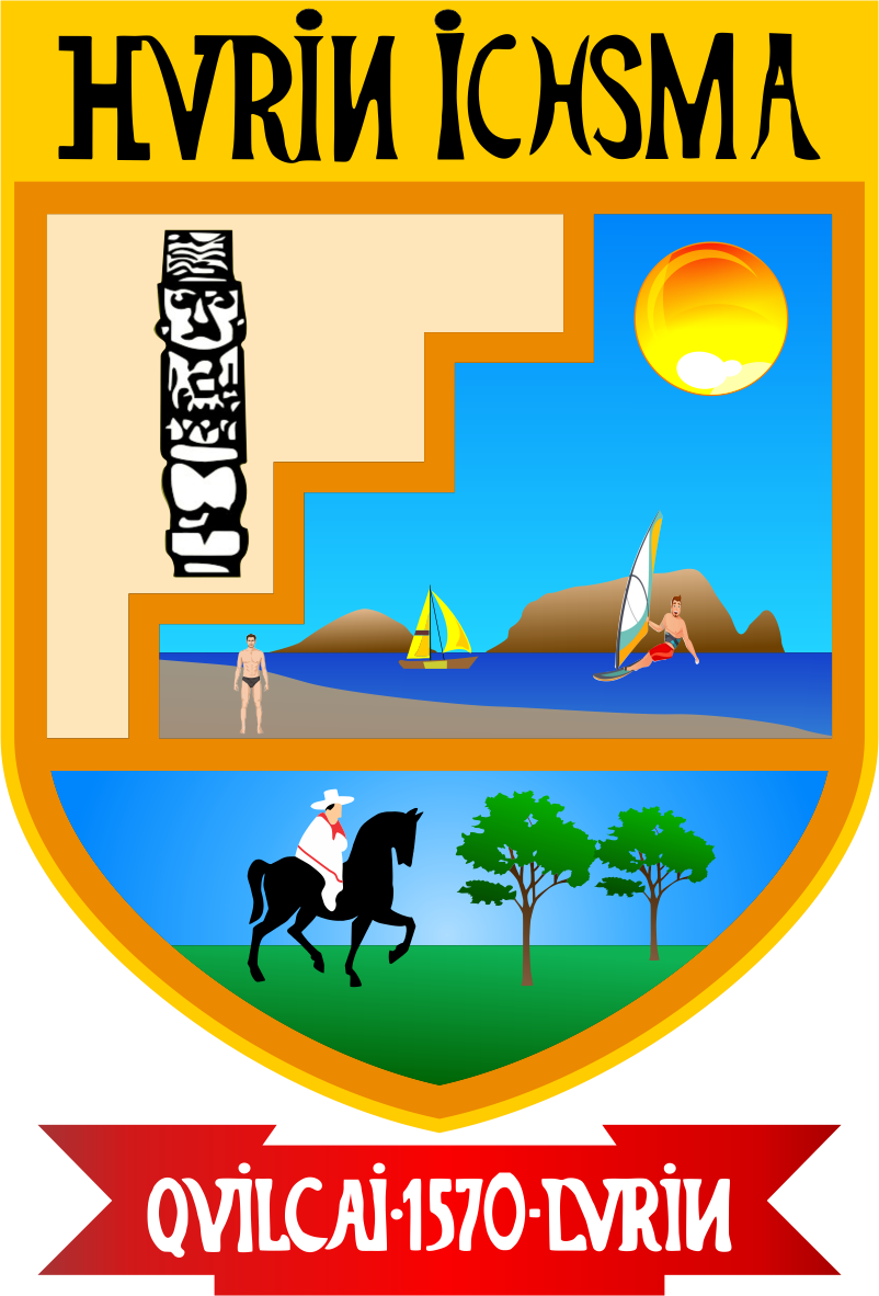 Escudo del Distrito de Lurín - Provincia de Lima - Región Lima